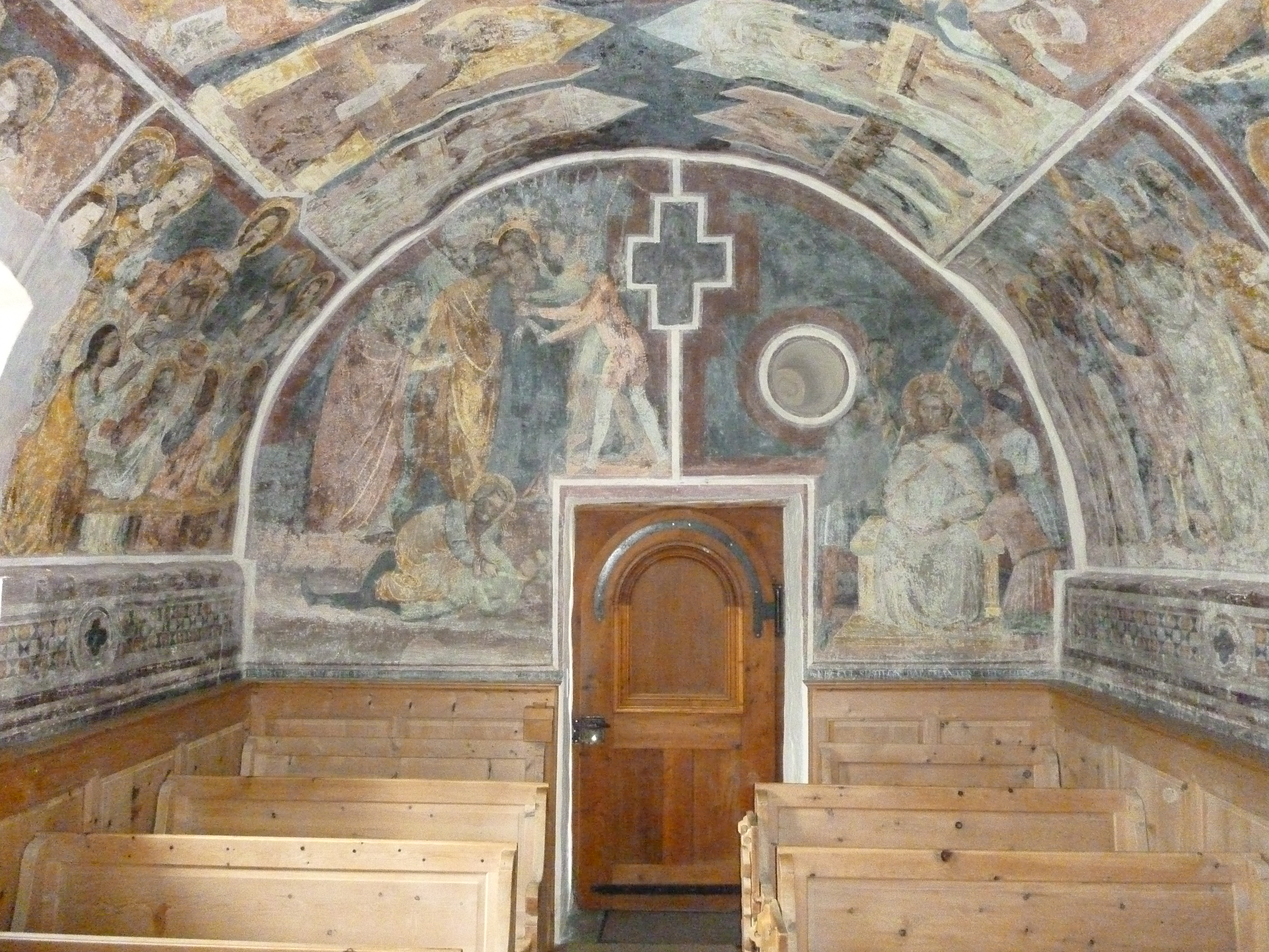 Reformierte Kirche Stugl: Eingang